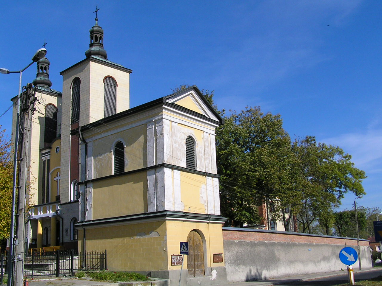 Piaski - kościół parafialny p.w. Podwyższenia Krzyża Świętego autor: Yarek shalom 20:04, 19 October 2006 (UTC)yarek shalom